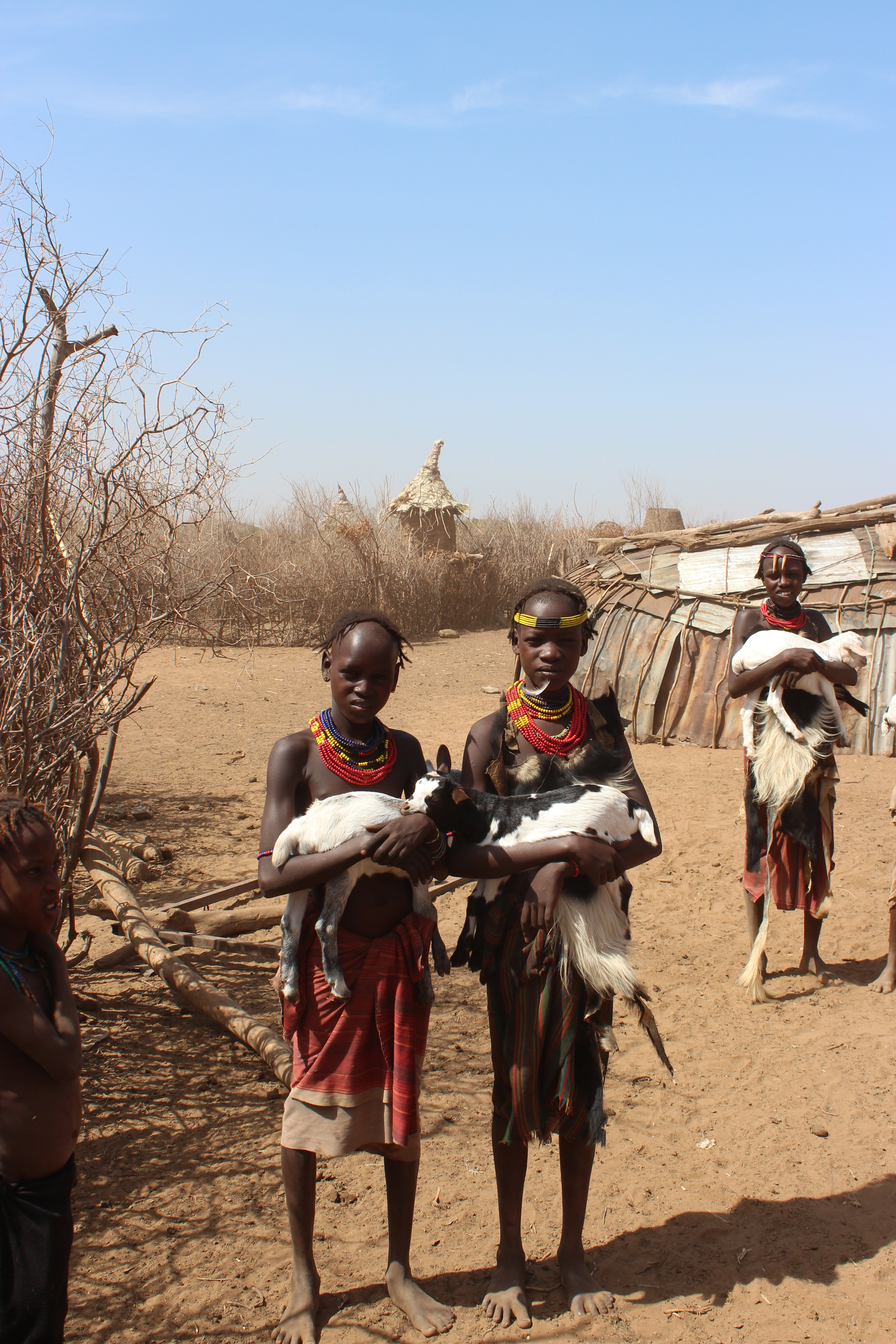 Photo prise dans un vvillage Dassanech est situé en Éthiopie, près de la rivière Omo, à proximité d'Omorate.